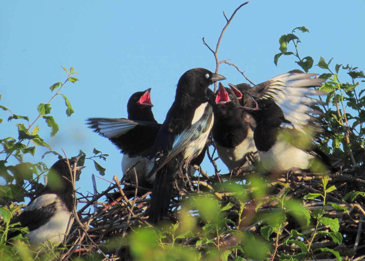 Original file: IMG_4082.TIF-single-new